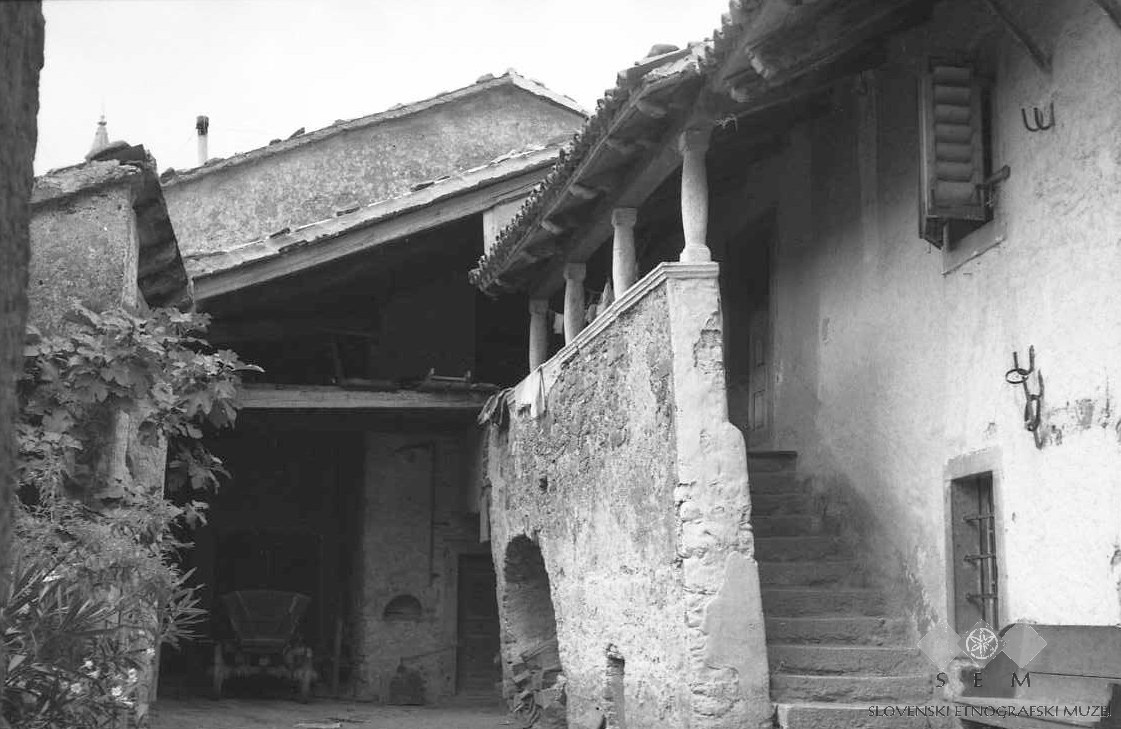 Prednja stran hiše pri Kodretu, Šembid.